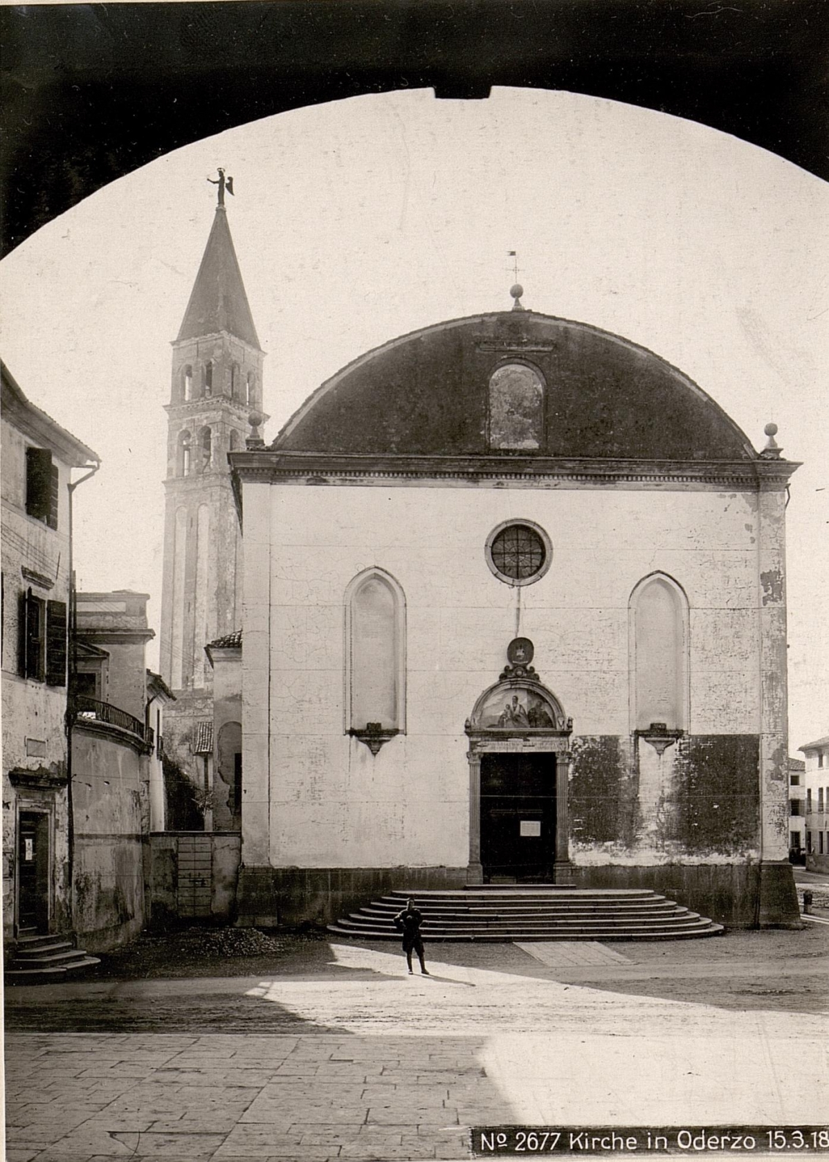 Teilweise handelt es sich um Aufnahmen, die nicht unmittelbar der Isonzofront zugeordnet werden können, sondern um Aufnahme aus den eroberten venetianischen Gebieten